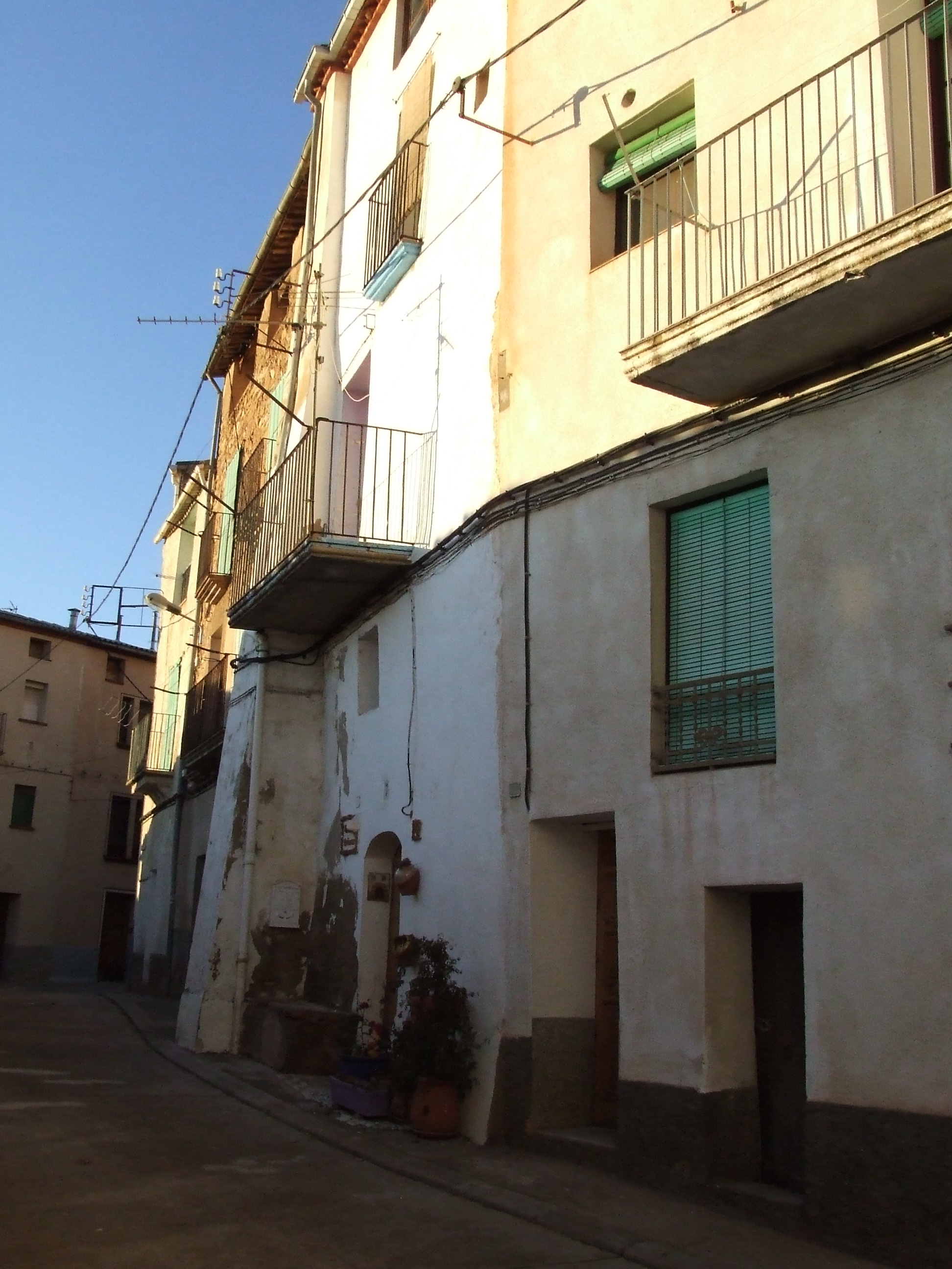 Costat sud-oest del clos de la vila (Vilamitjana, Tremp, Pallars Jussà)